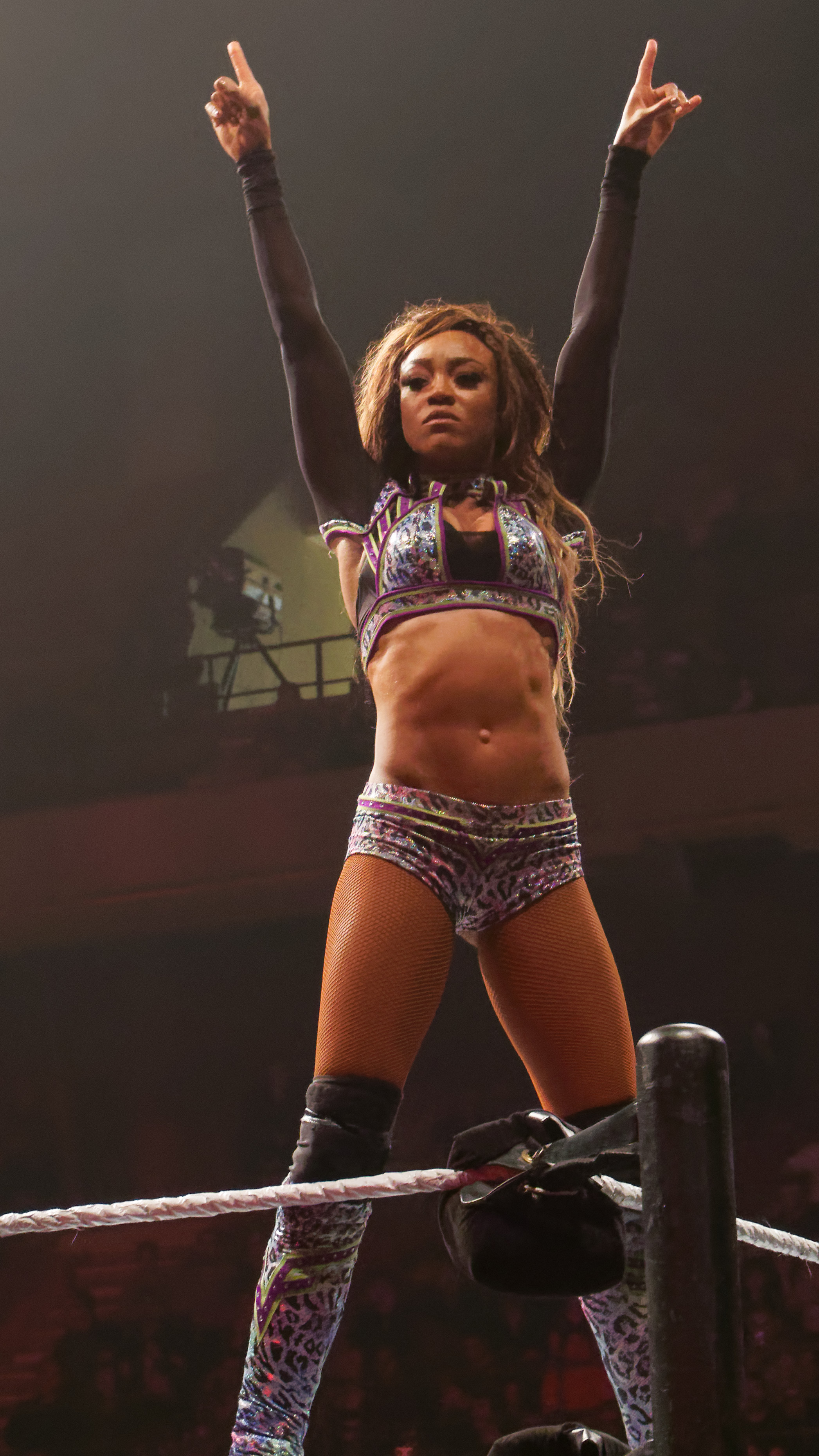 Dana Brooke & Sasha Banks defeat Alicia Fox & Nia Jax ( Le vendredi 12 mai, la WWE Live Tour fera escale au Country Hall a Liege pour le spectacle de catch de l'annee! Au programme: des duels impitoyables et des rencontres captivantes entre les meilleures equipes et les plus grands rivaux. )